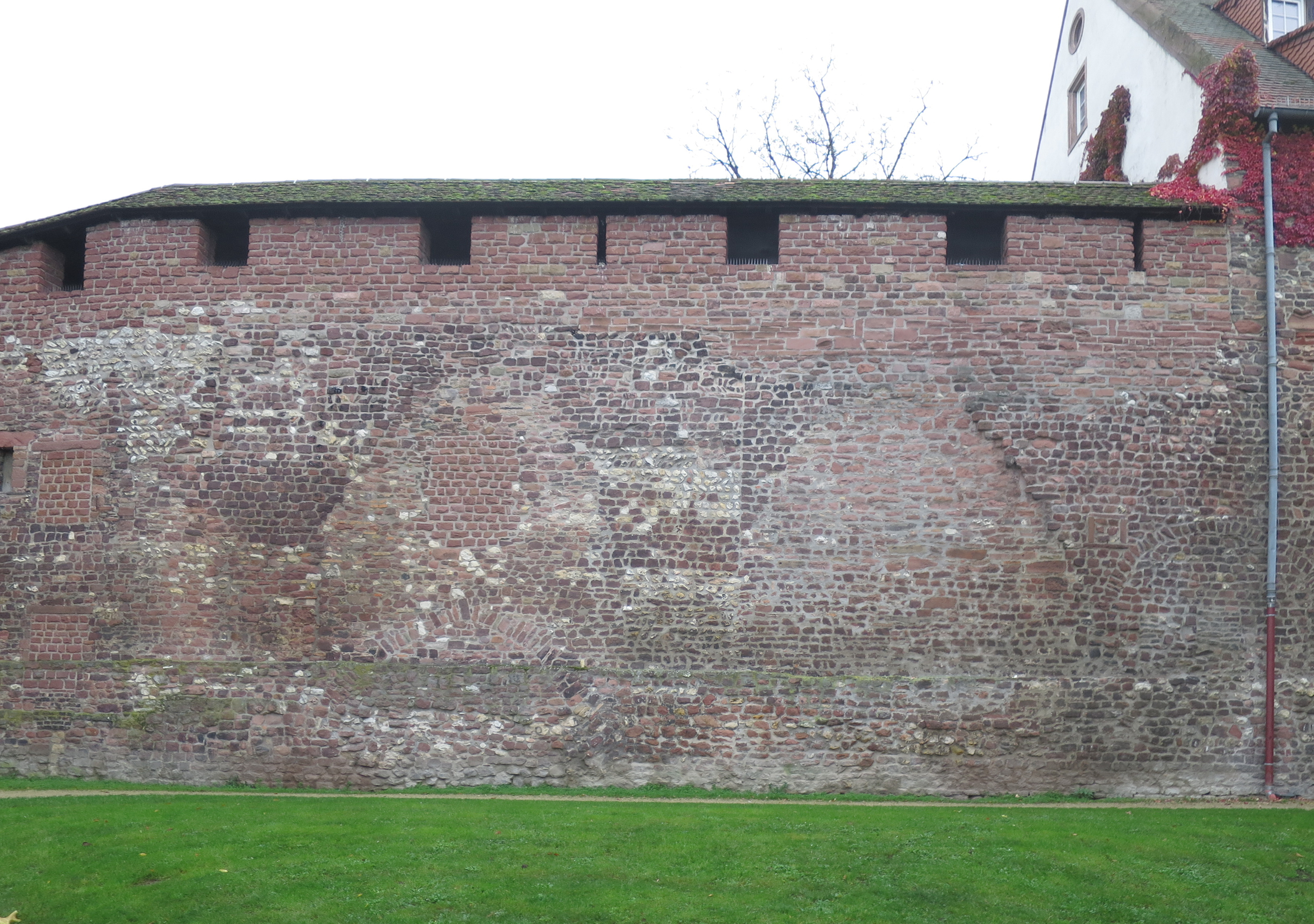 Stadtmauer Worms im Bereich der Judengasse